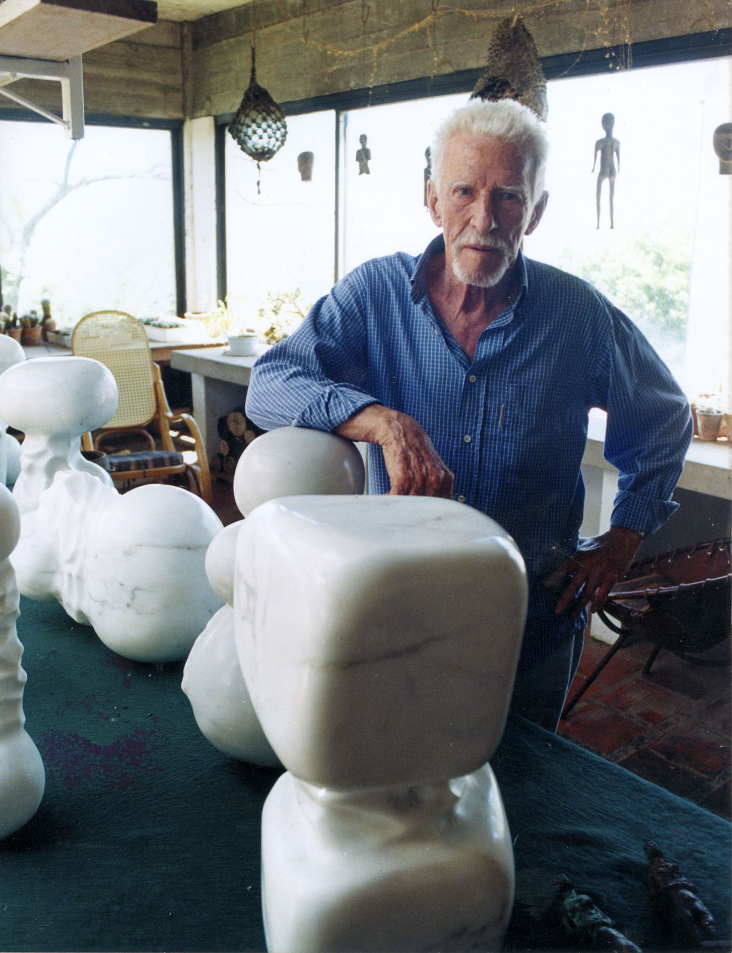 Stockinger em seu ateliê-residência, em 2001